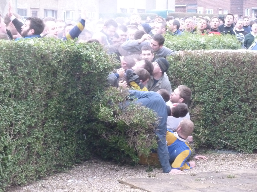 Hug beim Shrovetidefußball